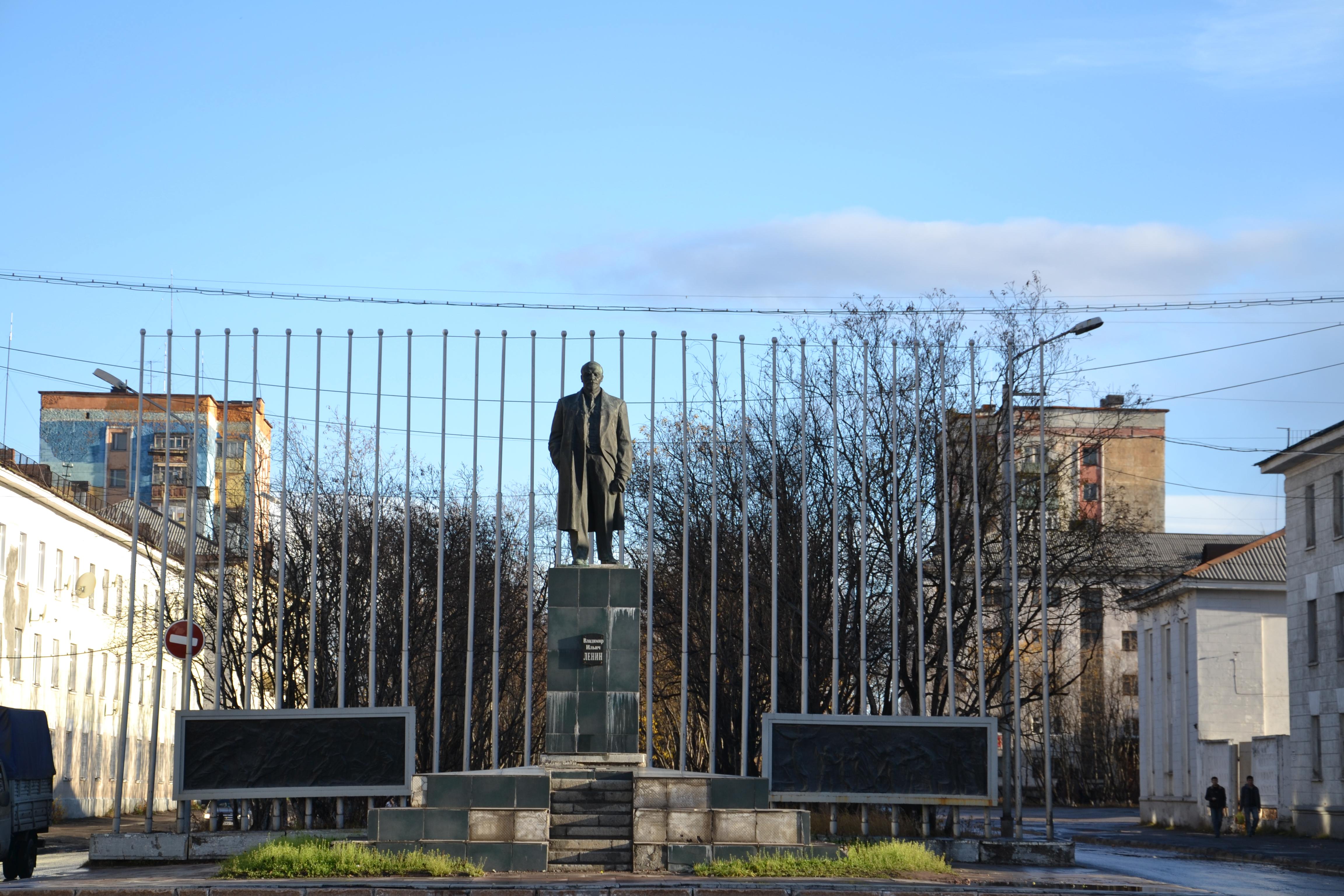 Находится на площади Мира, напротив фонтана.